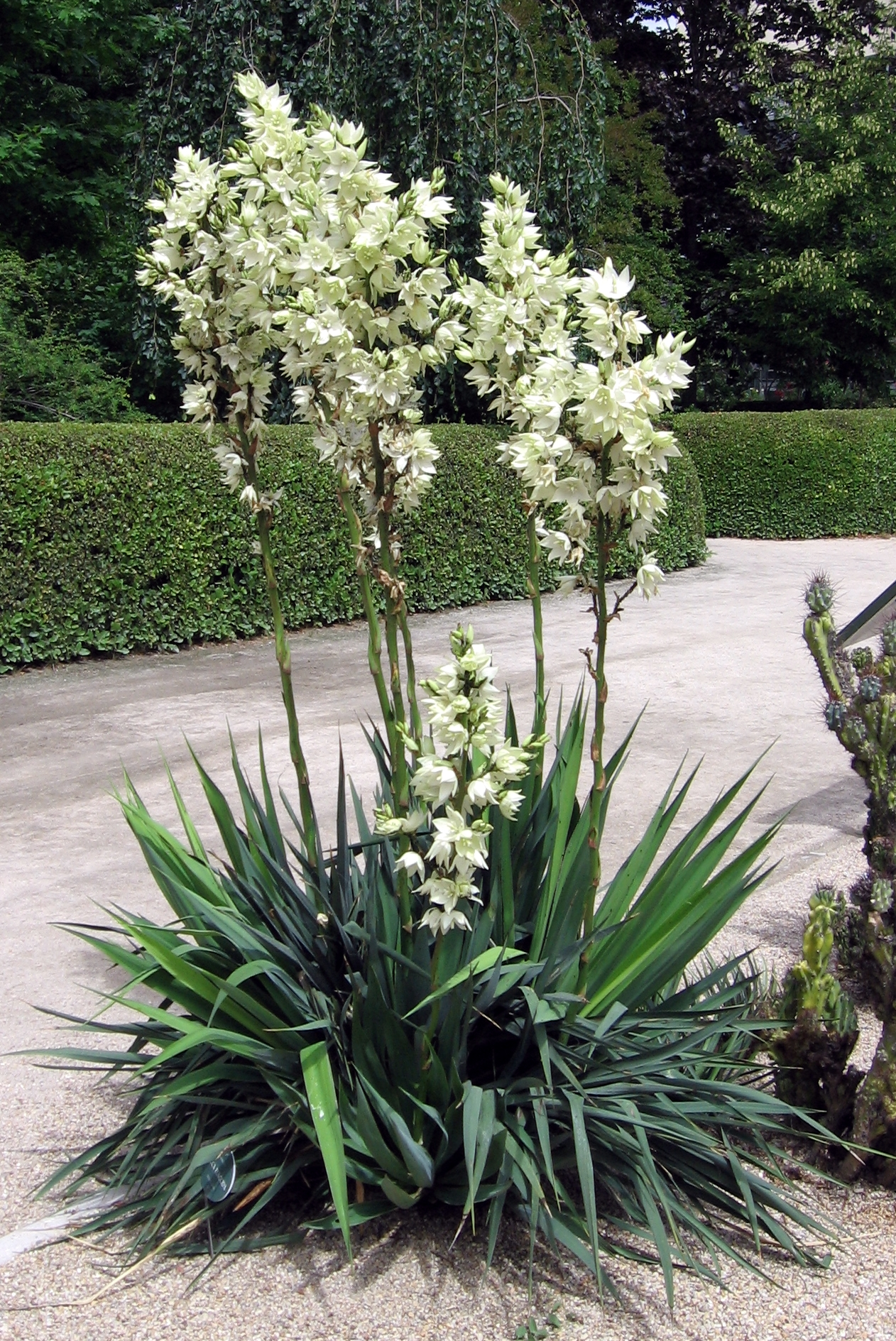 Yucca flaccida in the Royal Botanic Garden, Madrid